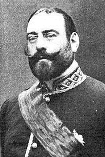 D. Manuel Allendesalazar, Ministro de Estado, obra del fotógrafo Christian Franzen, recogido en la revista española Actualidades (1908).